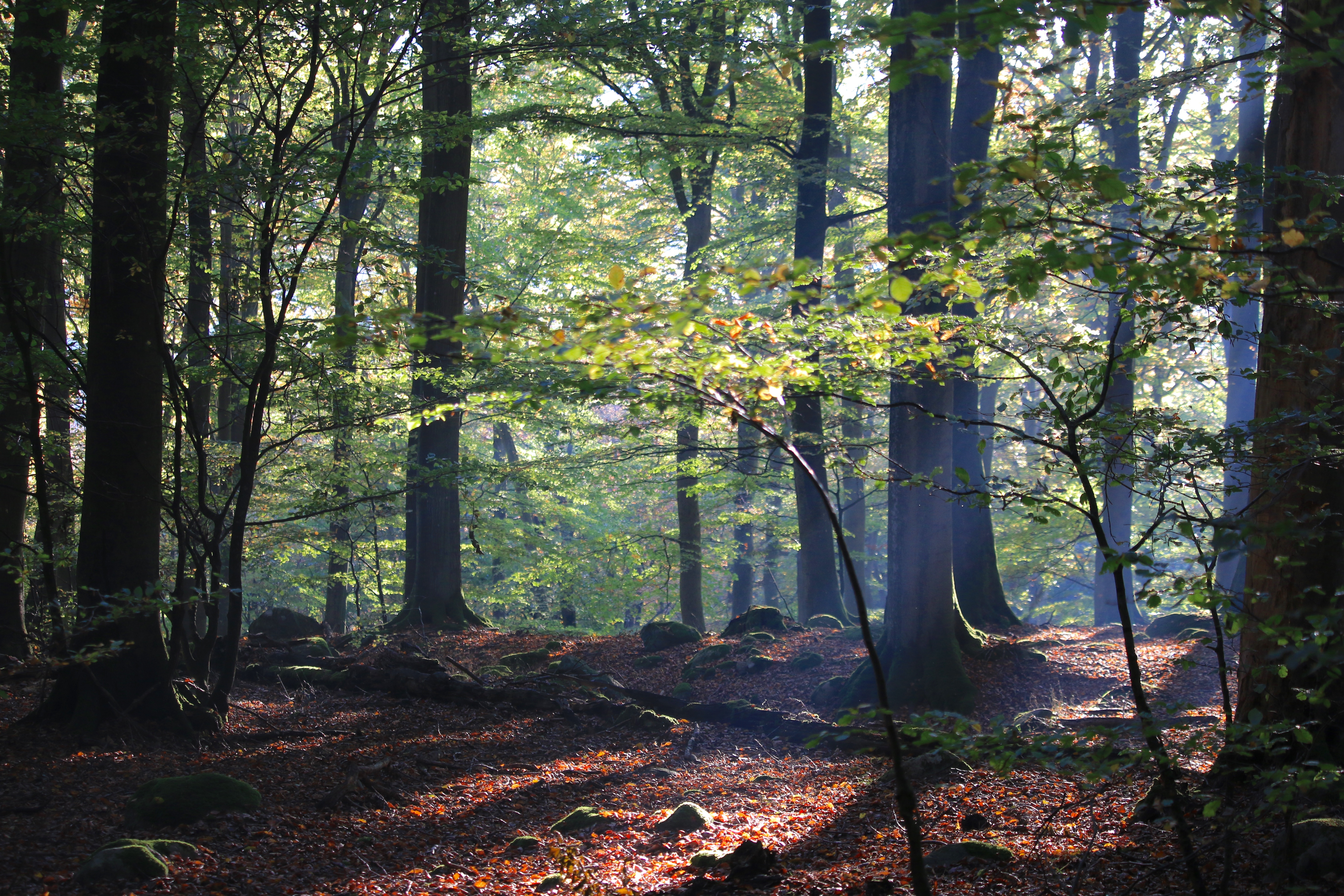 Västra Stenshuvud